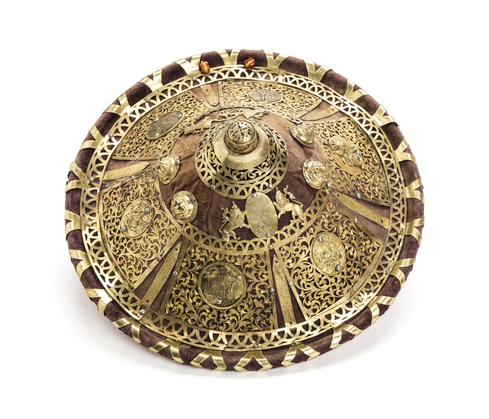 Liten rund konisk sköld med uppböjd kant. Klädd med lila sammet och rikt beslagen med genombrutna ornament av förgylld vit metall. På mitten toppig buckla med tillplattad topp, krönt av genombruten, rankmönstrad knopp i kronliknande form. På bucklan genombruten ranka och bågbård, ytterst graverat sicksackband. Därnedanför fyra gjutna lejonhuvuden och mellan dessa två par sköldhållande lejon (gjutna) det ena paret hållande en oval sköld med graverad etiopisk inskrift och årtalet 1935. År 1935 överlämnad som gåva av Kejsare Haile Selassie av Etiopien till dåvarande kronprinsen Gustav (VI) Adolf. Det andra håller trepass med inskriven treuddig stjärna och tre etiopiska bokstäver. Därnedanför runt skölden genombruten bågbård och sex stora rektangulära plattor med genombrutet rankmönster med graverade detaljer och i mitten runda och ovala medaljonger, två runda med etiopiska riksvapnet i driven relief, tre ovala med St. Georg och draken i samma teknik och en rund med ett gjutet stående krönt lejon pånitat. Därnedanför genombruten bågbård. Runt kanten diagonala bandbeslag med linjer längs kanterna. Alla beslag fästa med runda välvda nitar i vit metall. Skölden fodrad med röd marokäng, på mitten ett stort fast u-format handtag klätt med samma material. I handtaget är en remögla av röd marokäng fäst och vid kanten är en upphängningsögla av samma material.